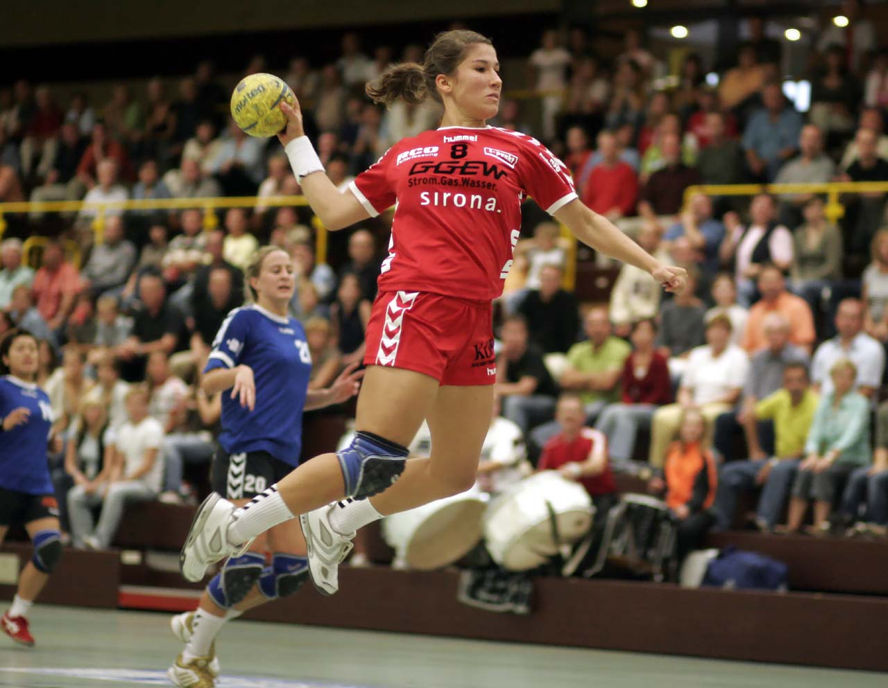 Mara Friton, on September 30th 2006 in Bensheim (Germany), during the Bundesliga match HSG Bensheim/Auerbach - SC Riesa